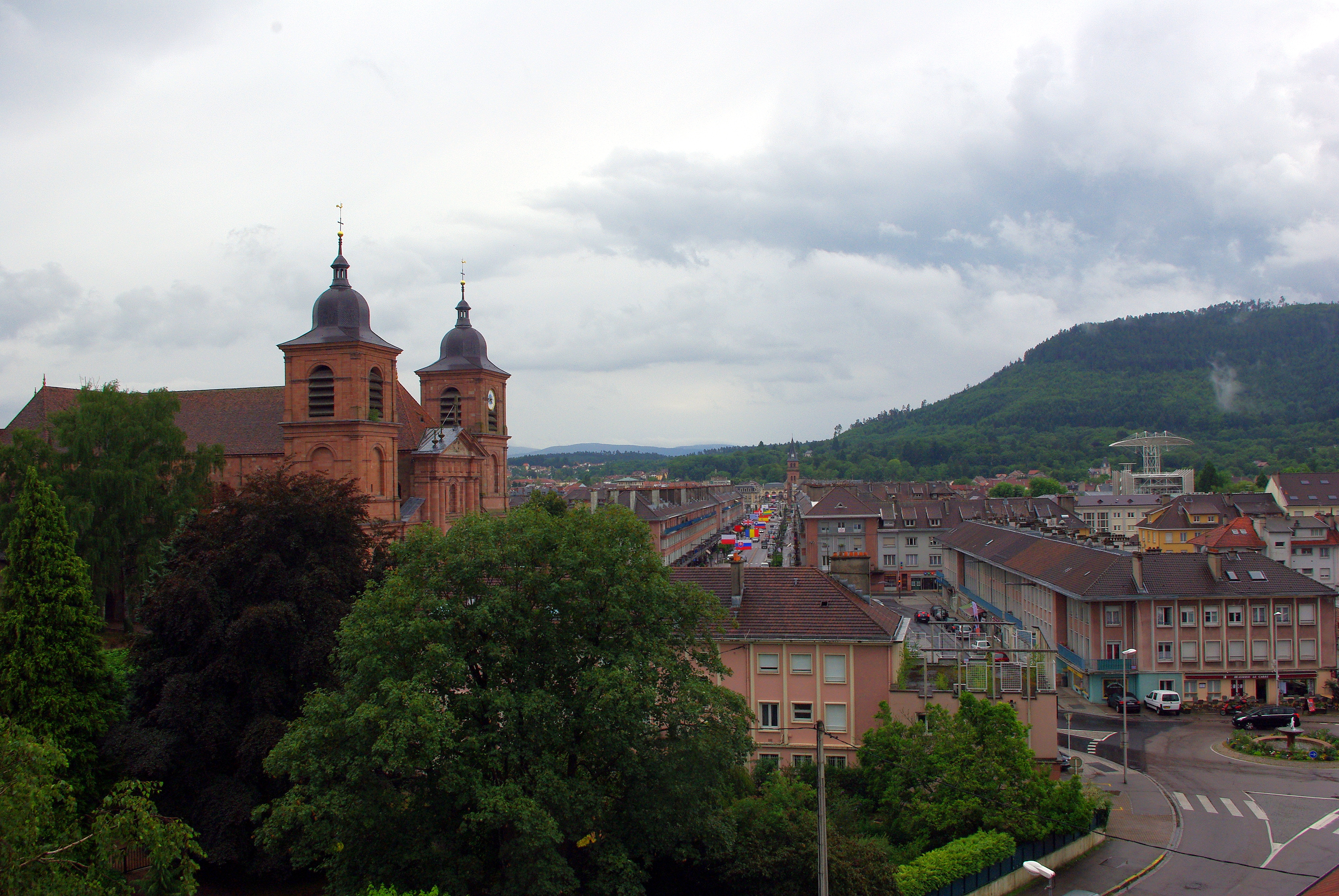 L'ensemble cathédral et la rue Thiers